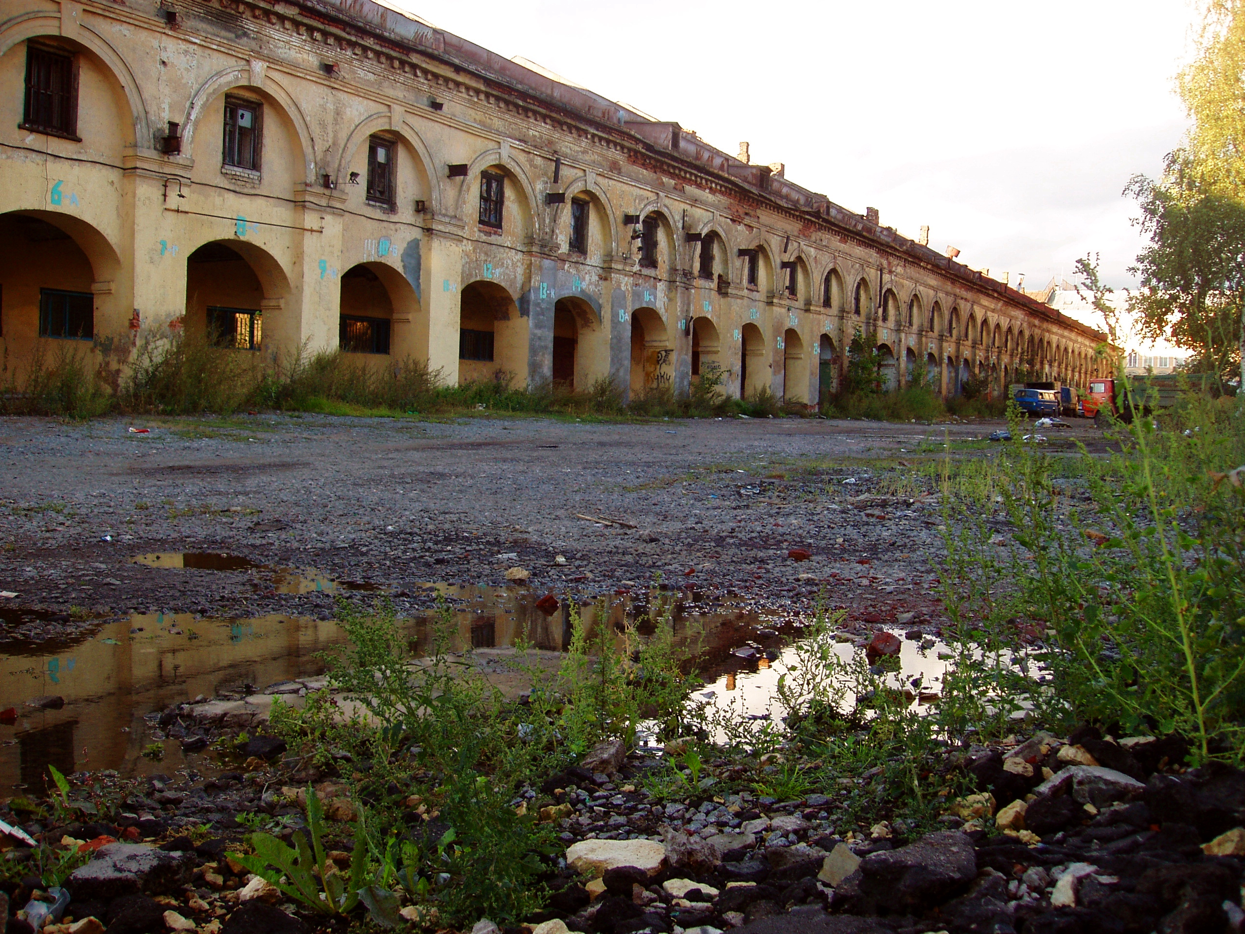 Никольские ряды, г. Санкт-Петербург, Россия